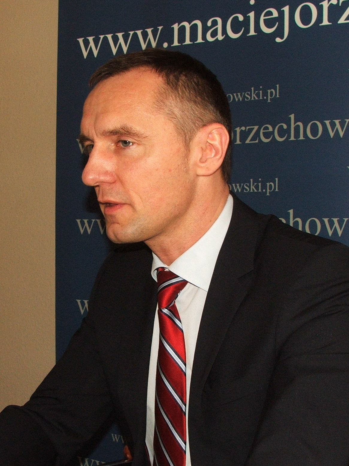 Poseł na Sejm Maciej Orzechowski